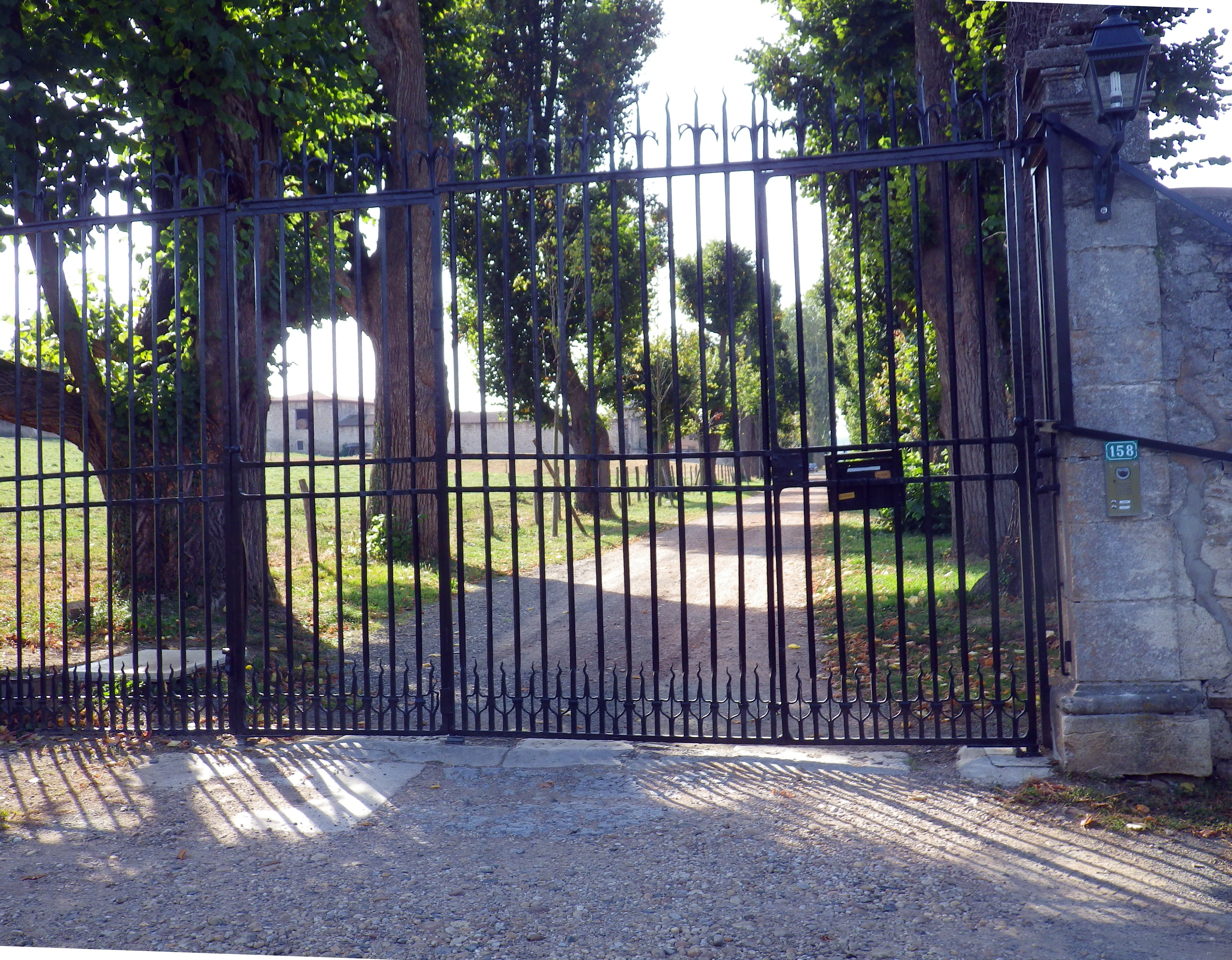 Château inaccessible au public